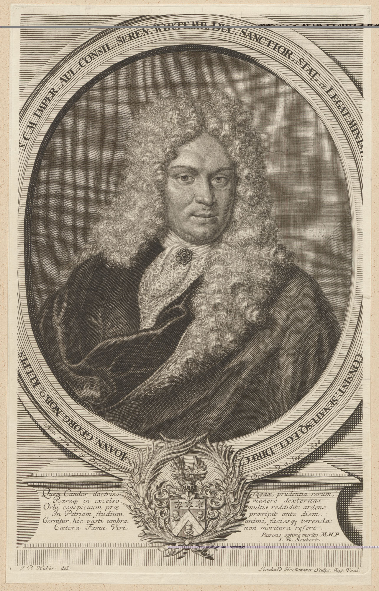 Johann Georg Kulpis (seit 1694 von Kulpis) (1652-1698)